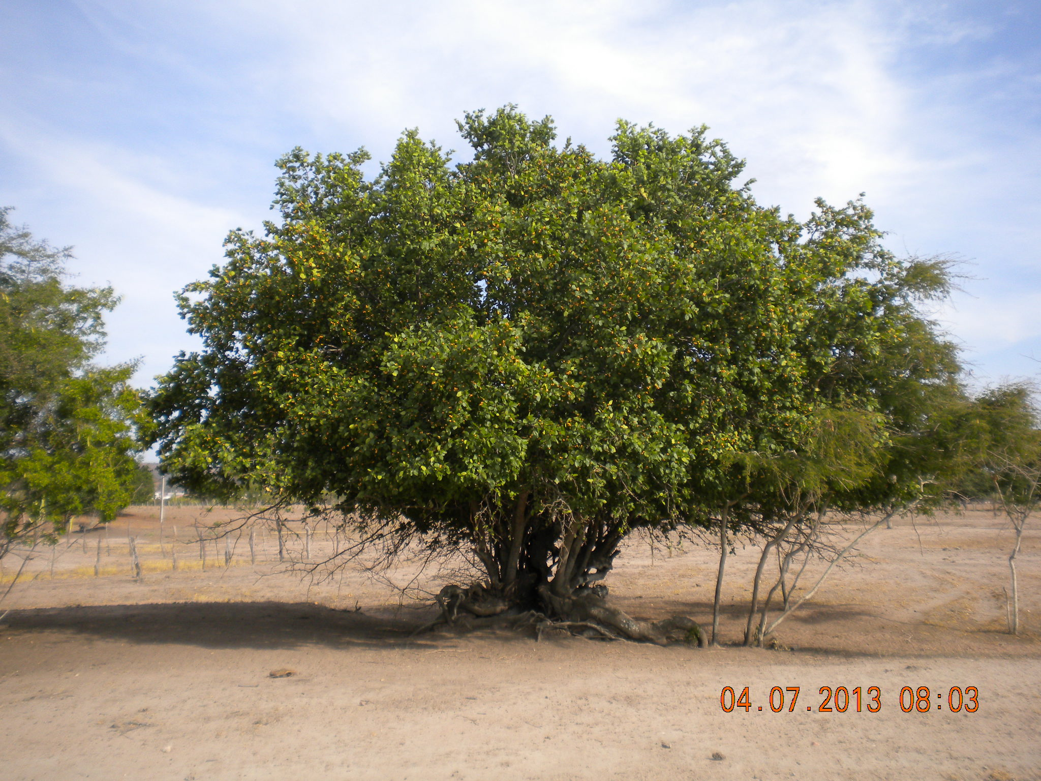 Árvore juazeiro repleta de frutos